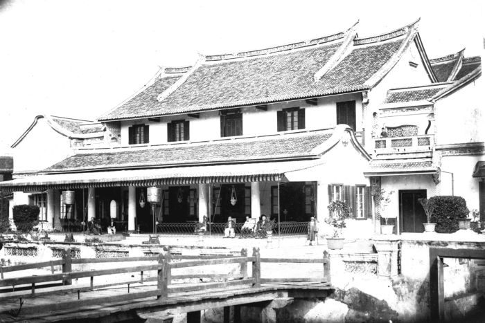 Foto. Album beslaat souvenir foto's van Java. Chinees huis in Semarang